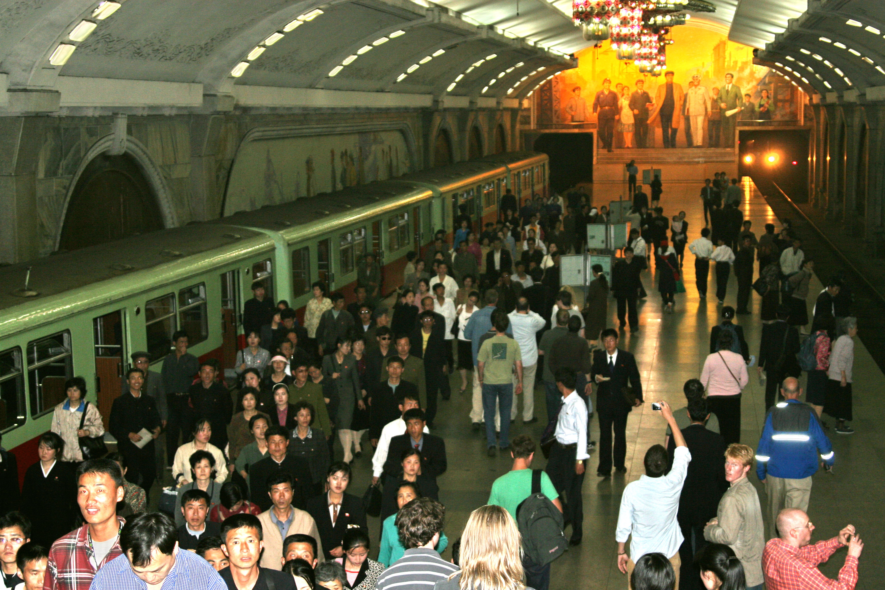 Rush hour in Pyongyang Metro